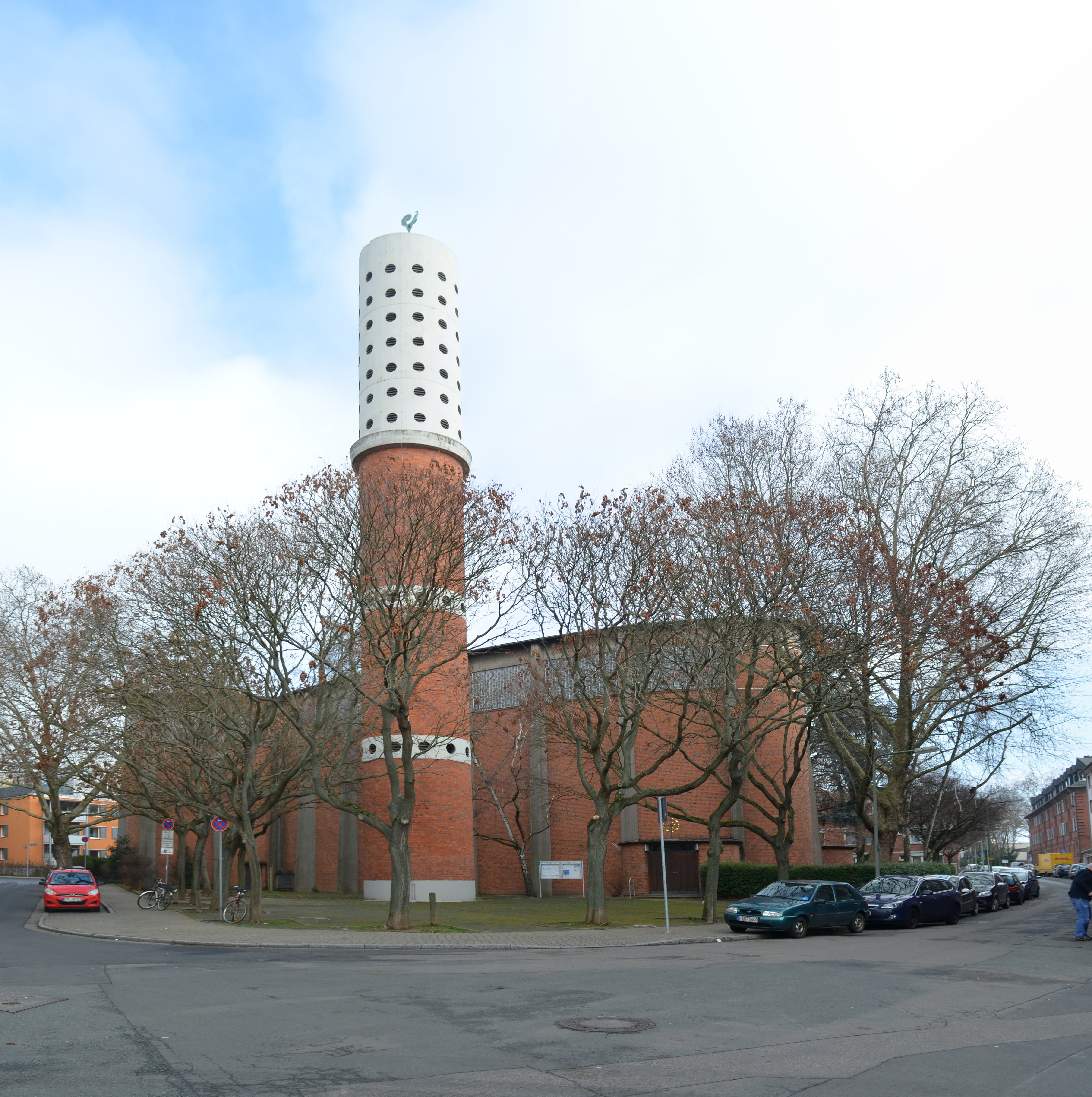 Frankfurt, Gellertstraße, St. Michaels-Kirche